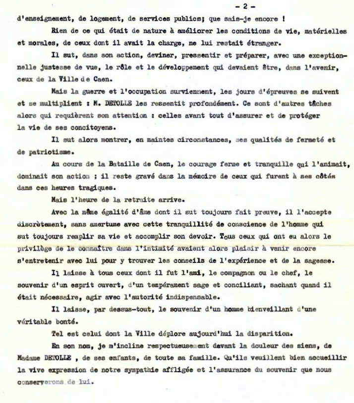 novembre 1962 : Hommage rendu à André par la ville de Caen, allocution de Jean-Marie Louvel (fin).